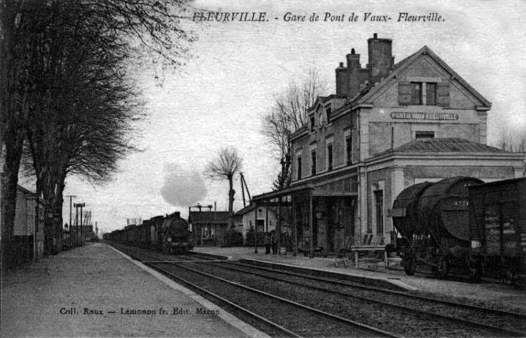 La gare PLM de Pont-de-Vaux - Fleurville vers 1900. Avec le bâtiment voyageurs de l'architecte Alexis Cendrier, et l'annexe ajoutée à sa droite.